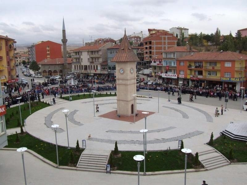 Akyurt Merkezden Görünümdür. (Akyurt district of Ankara in Turkey)